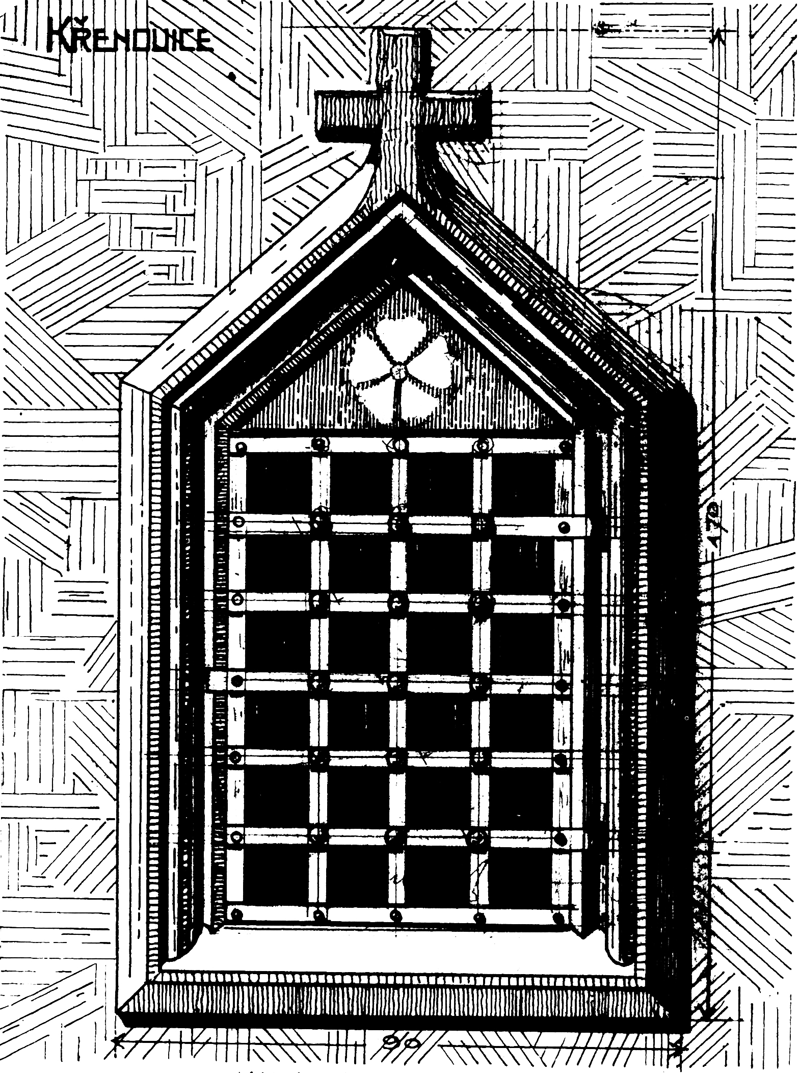 kresba sanctuaria